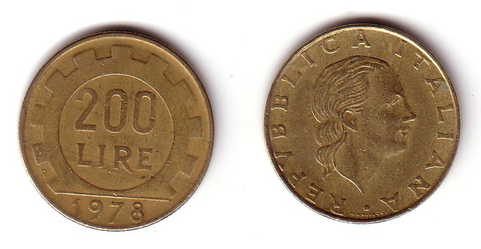 Moneta italiana da 200 lire, anno 1978